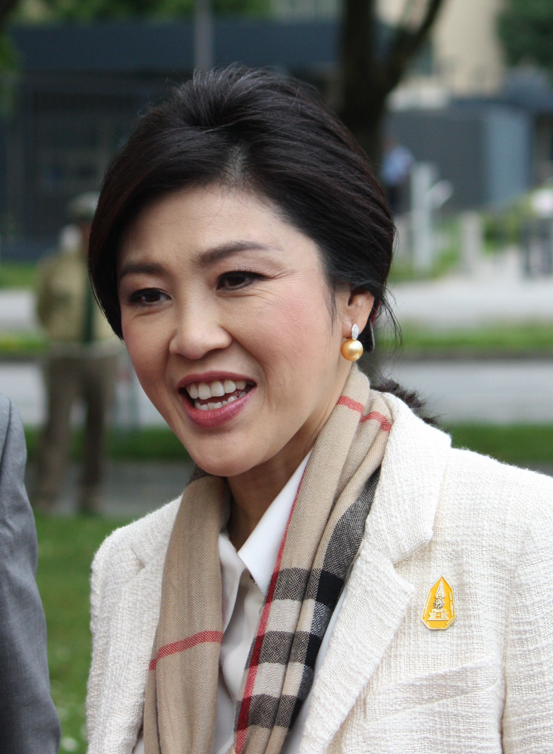 Die thailändische Premierministerin Yingluck Shinawatra in München